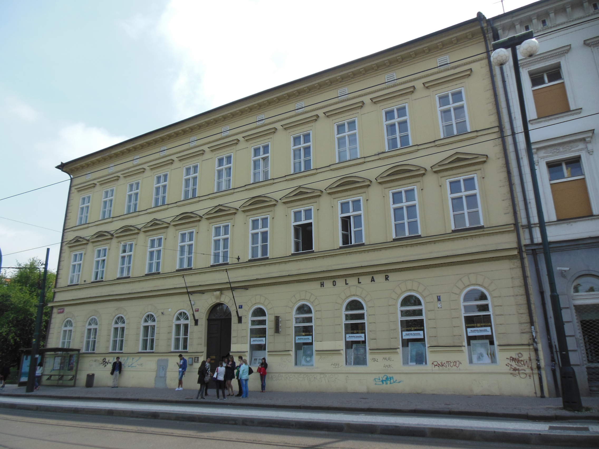 Dům č. 995/6 na Smetanově nábřeží na Starém Městě v Praze.